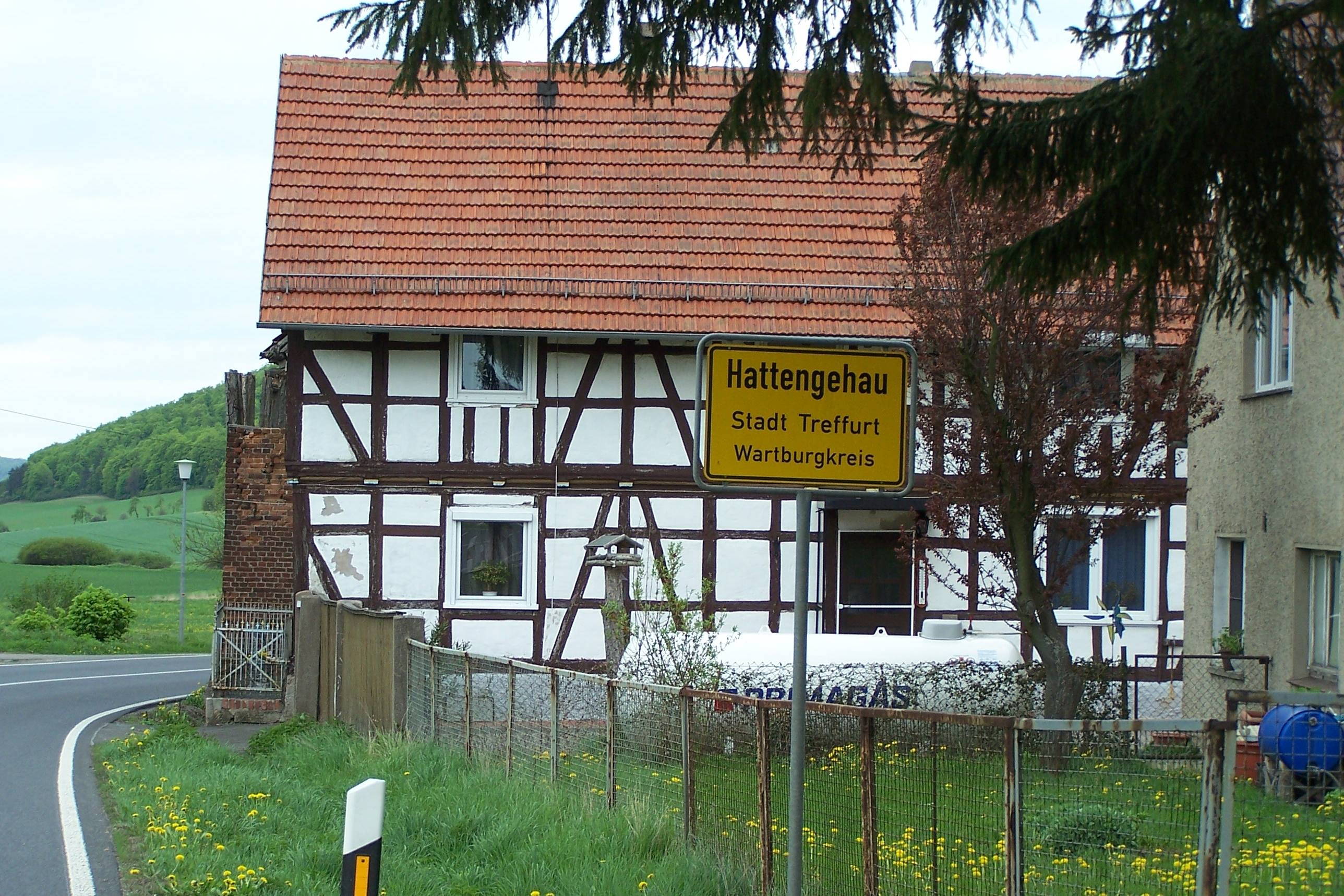 Am Ortsrand des Weilers Hattengehau bei Treffurt.